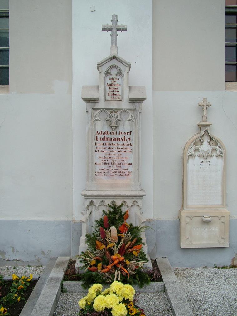 Grab Bischof Lidmansky